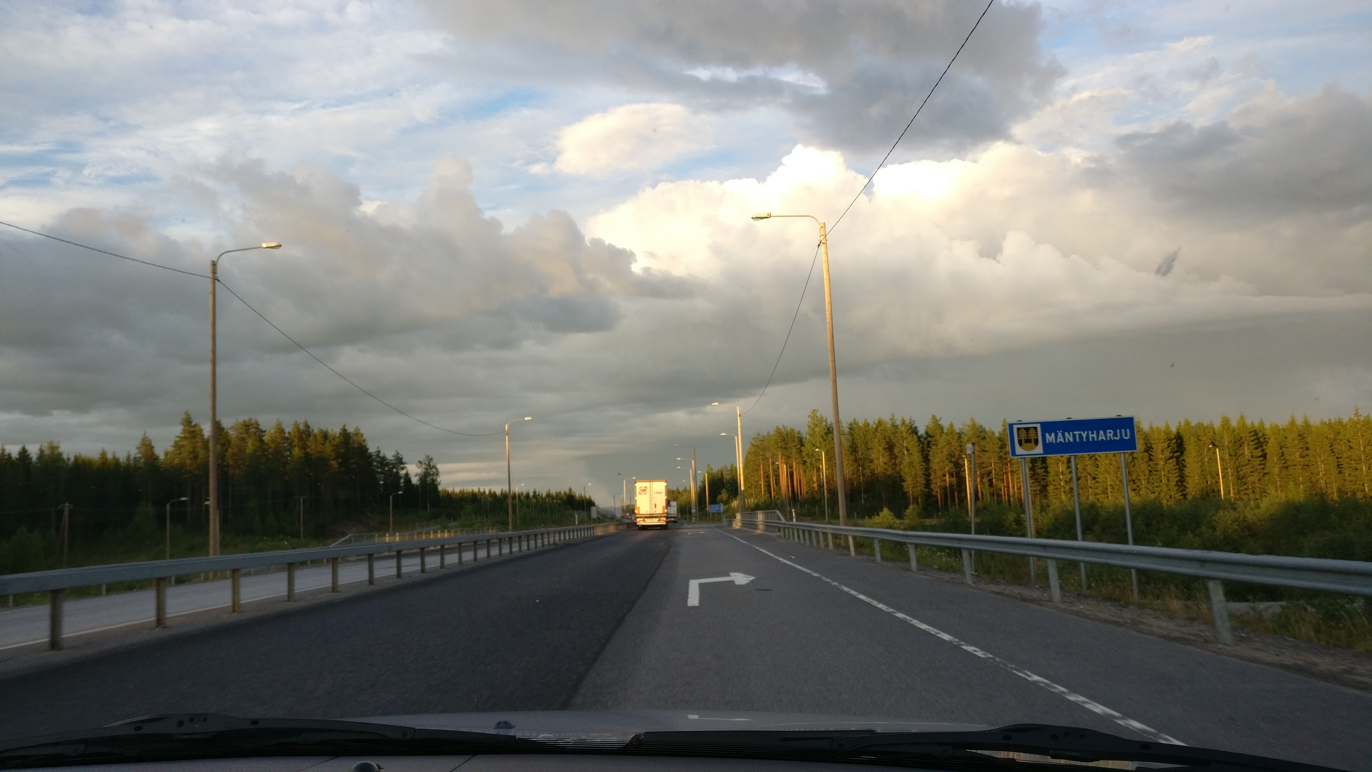 Koirakiven liittymä Valtatie 5:llä.